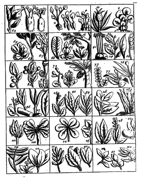 Illustratie uit l'Histoire de la Grande Isle Madagascar, door Étienne de Flacourt